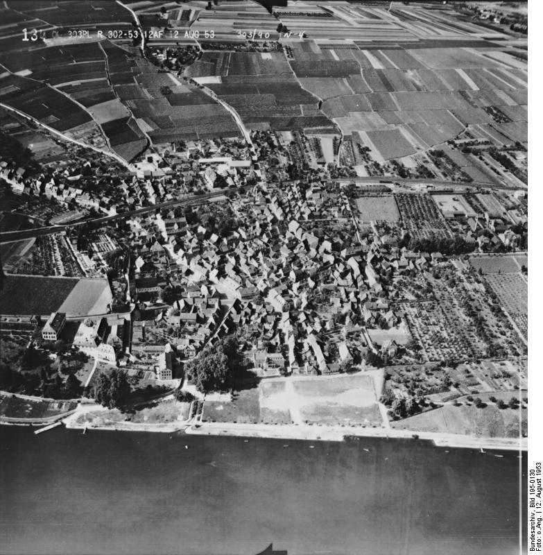 Rheinbefliegung der Alliierten 1953